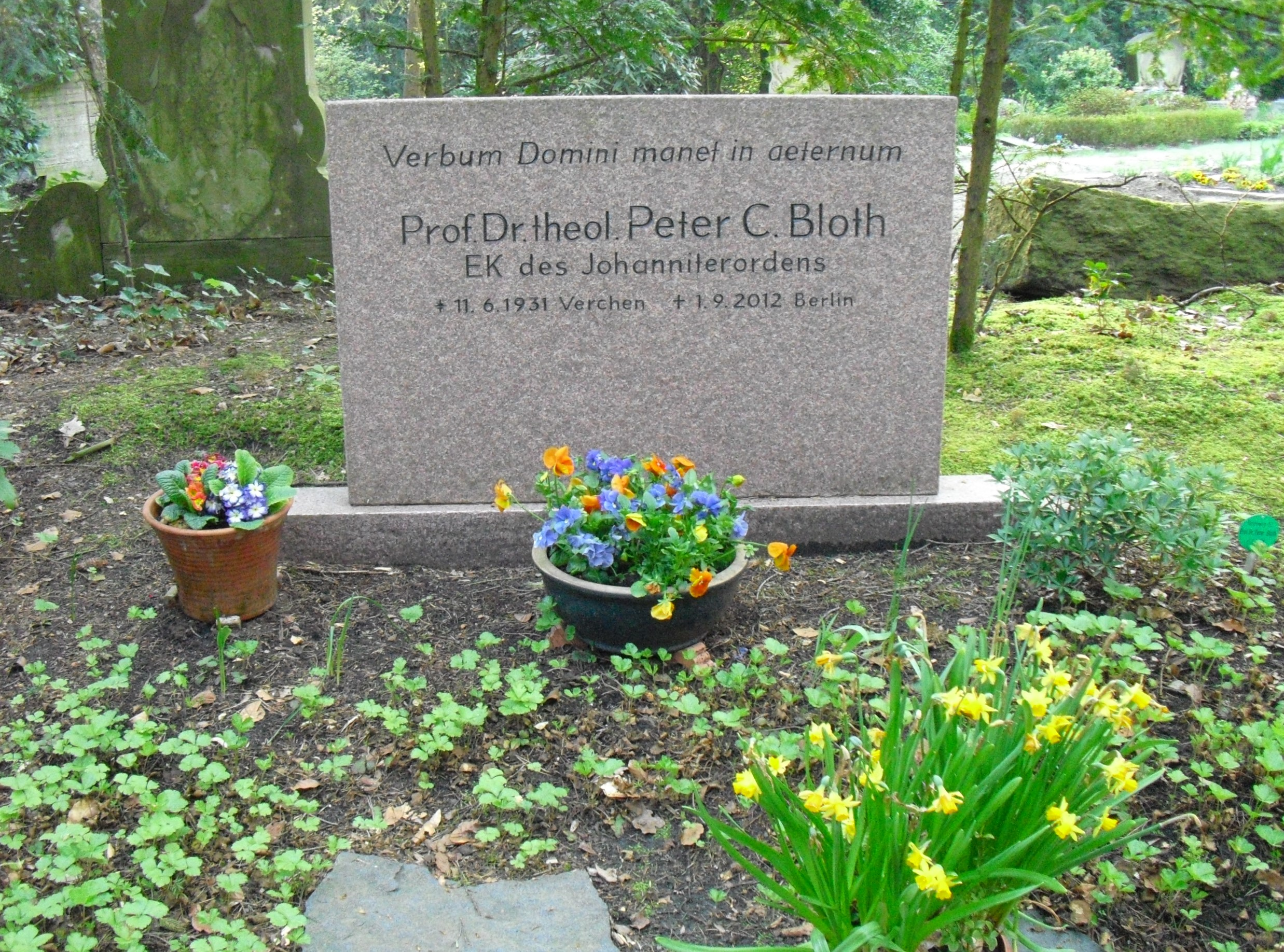 Grab des Theologen Peter C. Bloth auf dem Parkfriedhof Lichterfelde in Berlin-Lichterfelde